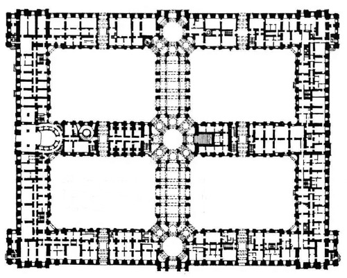 Поземний план палацу Казерта роботи італійського архтектора Луїджі Ванвітеллі 1751 року